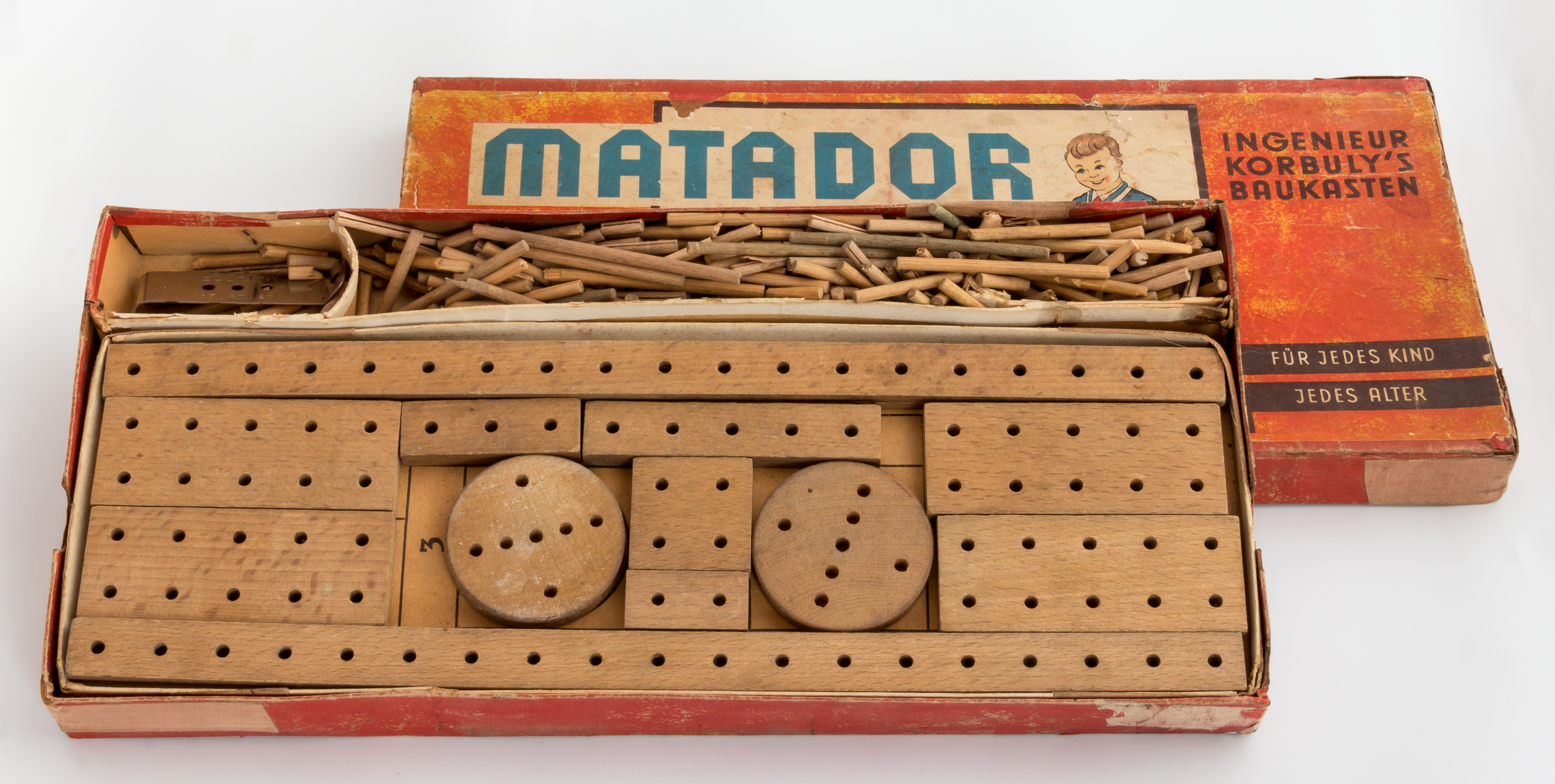 Matador-Holzbaukasten